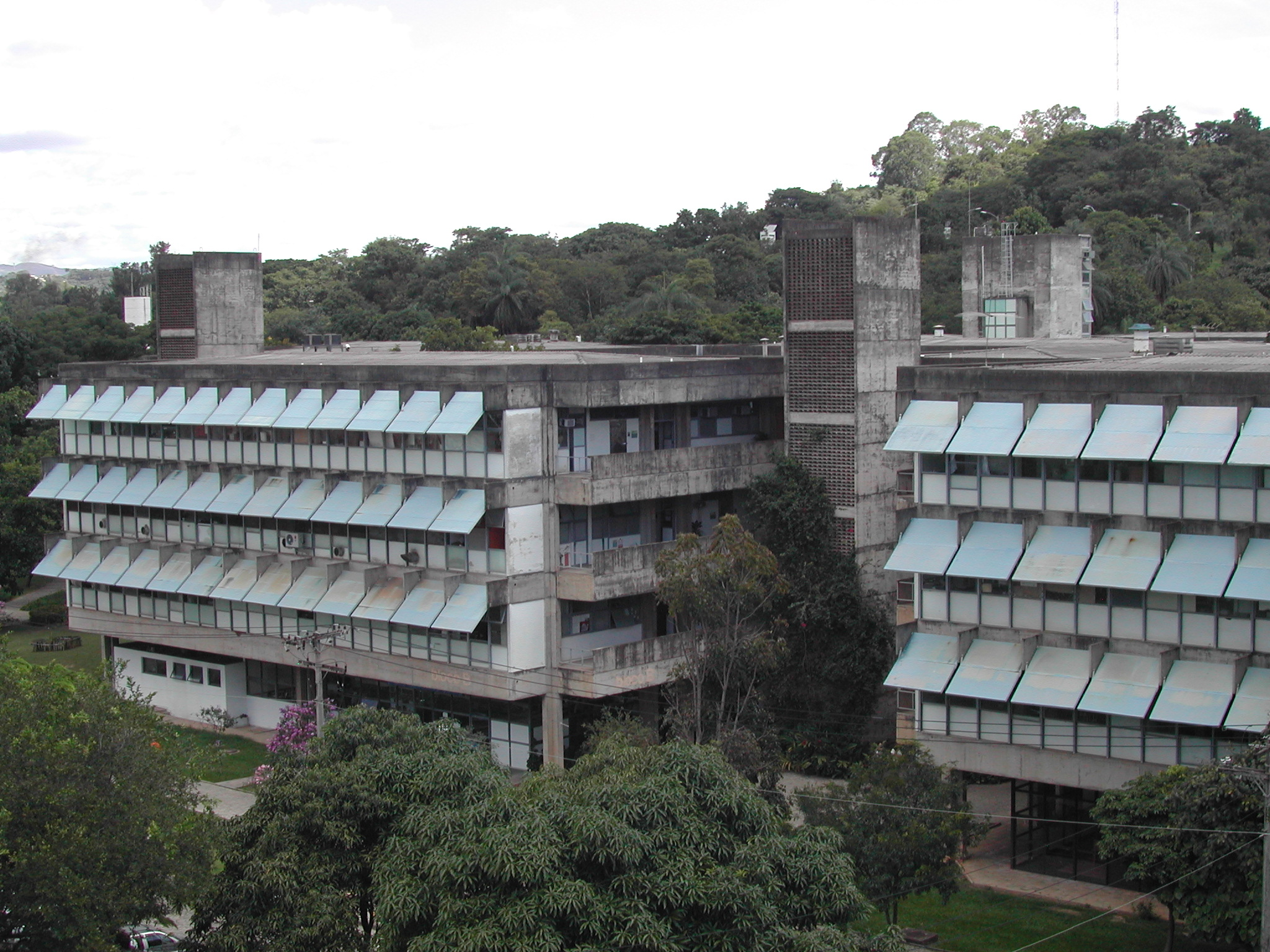 Instituto de Ciências Biológicas (ICB) da Universidade Federal de Minas Gerais, Brasil